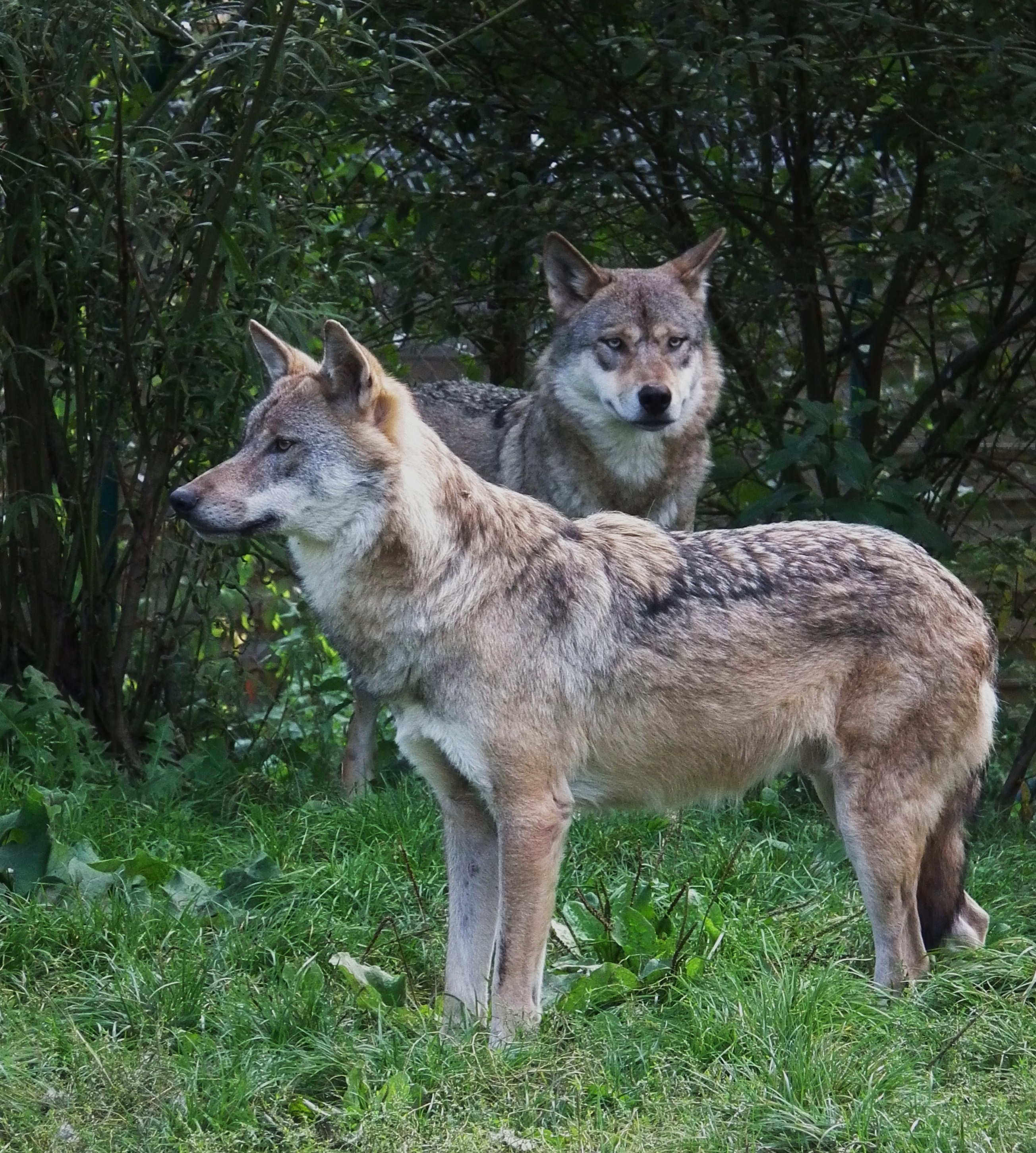 Eurasischer Wolf (Canis lupus lupus) im Tiergarten Worms (Rheinland-Pfalz, Deutschland)